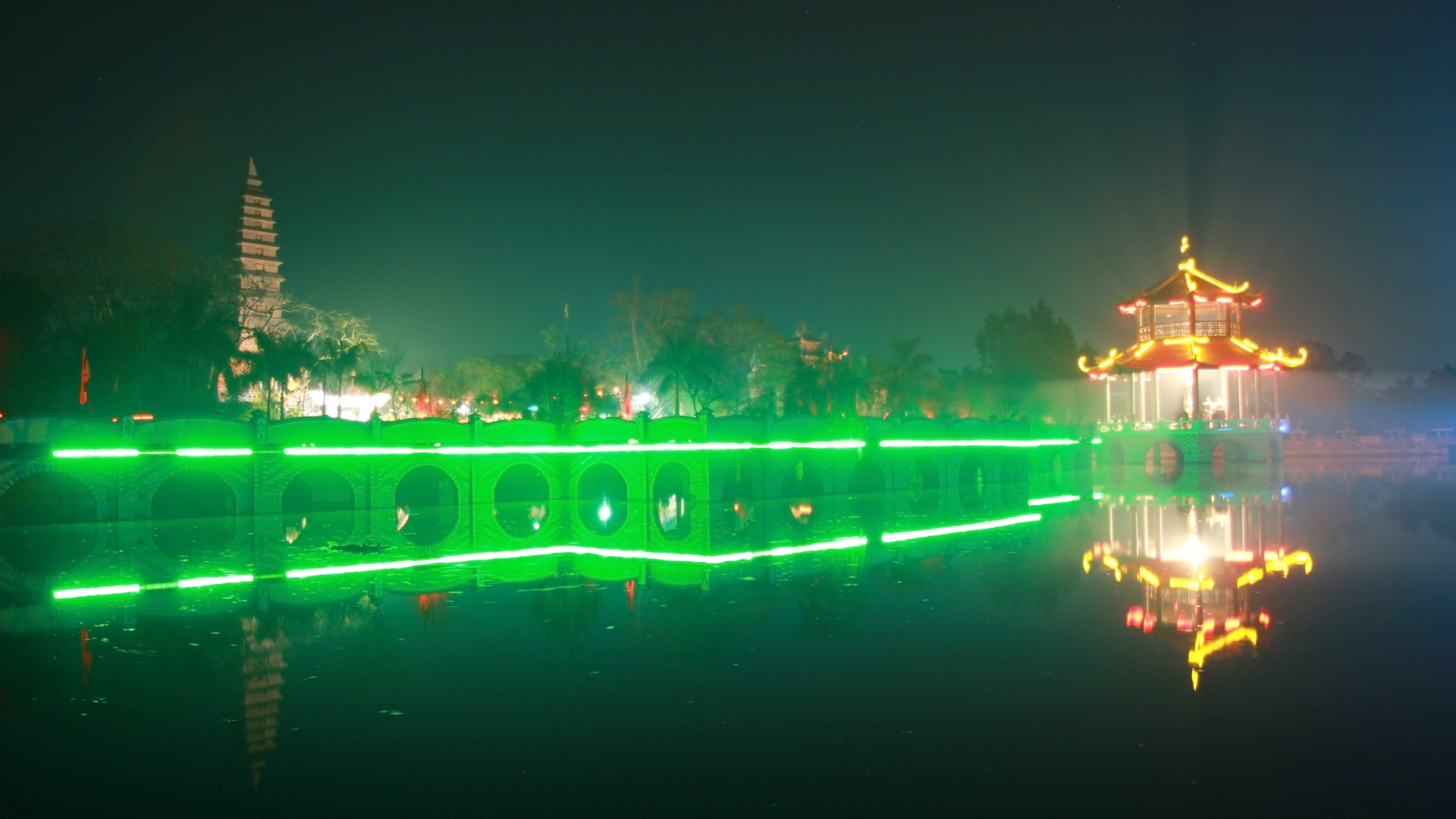 Không khí đón Giao thừa lúc 21h22p Tại Chùa Nho Lâm xã Mai Động, Hưng Yên